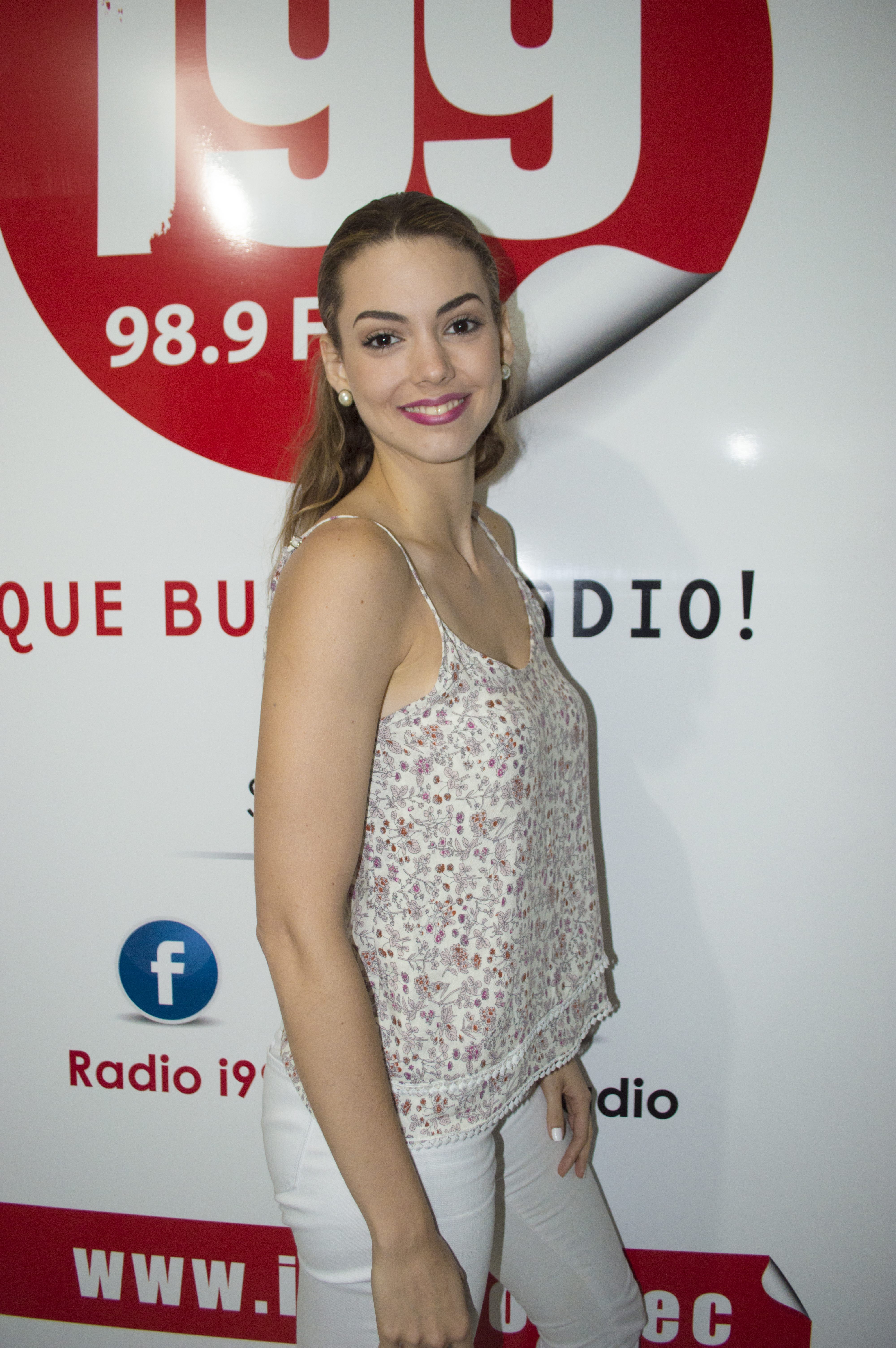 Carolina Aguirre Pérez ex-Miss Ecuador 2012 en la radio i99 donde es locutora en 2017.